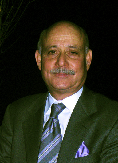 Jeremy Rifkin nach einem Vortrag in Ravensburg